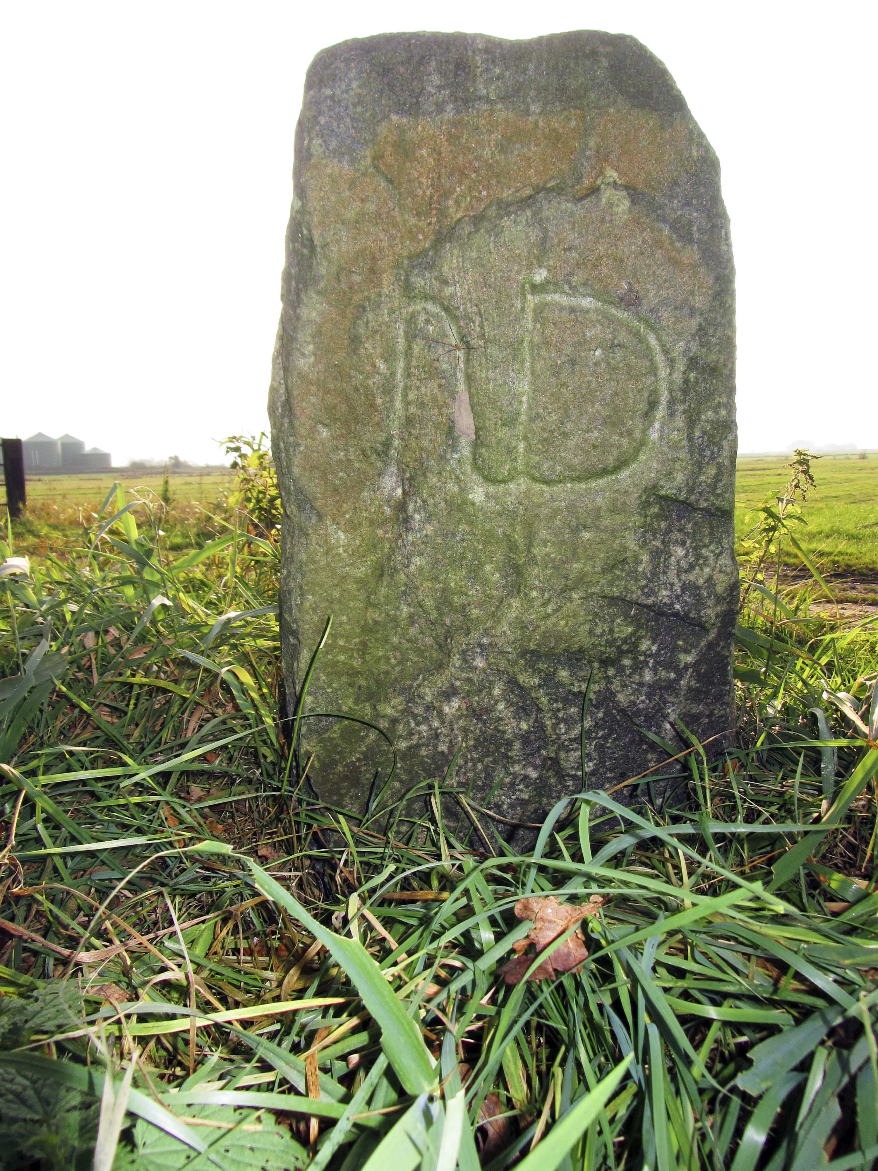 Historischer Grenzstein in Hochfeld bei Heide